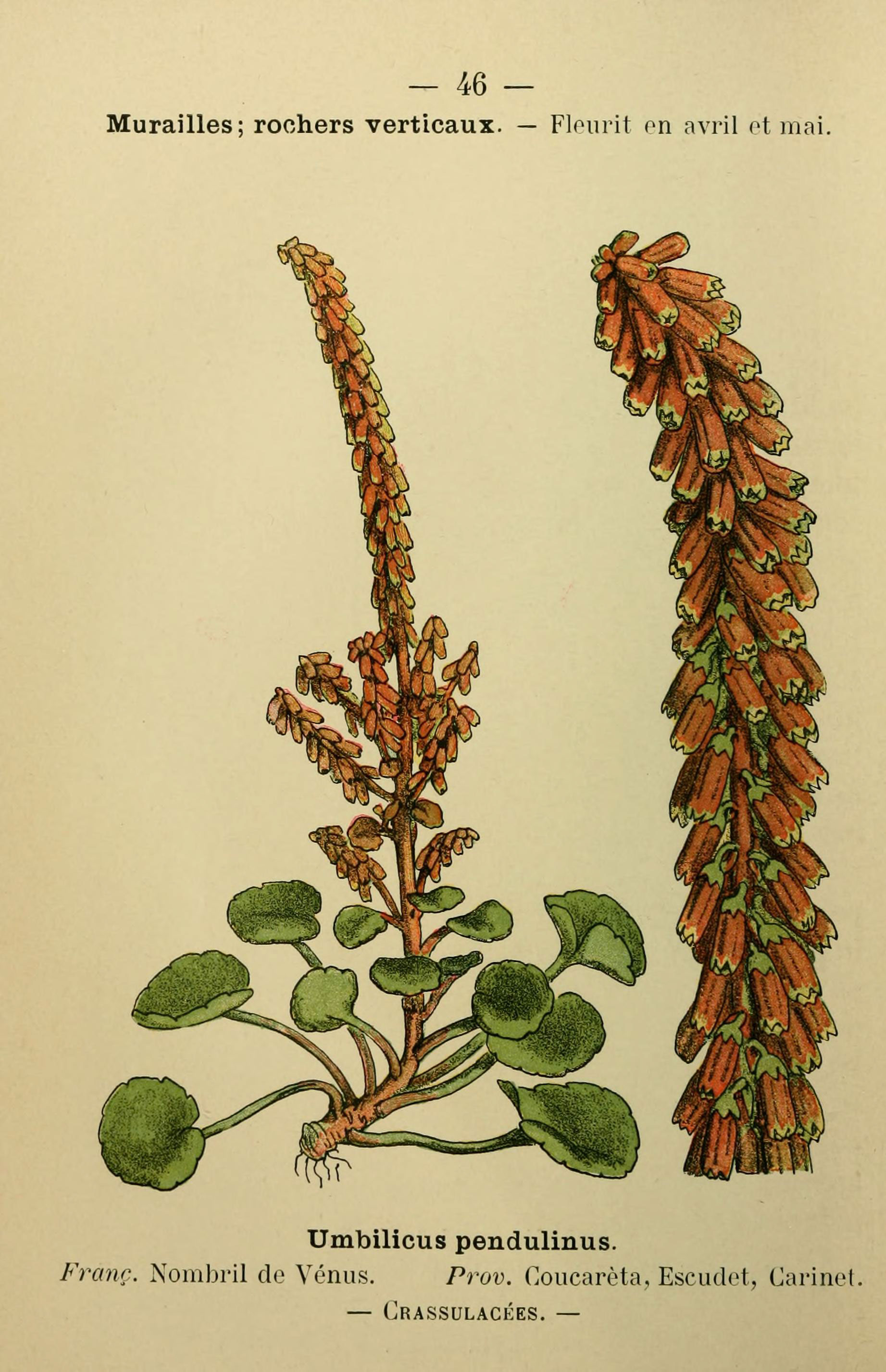 — 46 — Murailles ; rochers verticaux. — Fleurit en avril et mai. Umbilicus pendulinus. Franc. Nombril de Vénus. Prov. Coucarèta, Escudot, Carinet. — Crassulacées. —